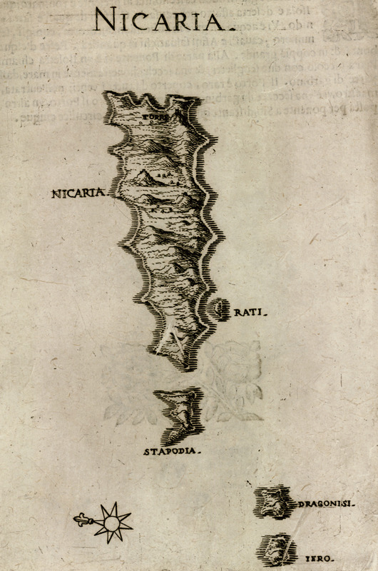 Marco Boschini. L’Arcipelago con tutte le Isole, ScogliSecche e Bafsi fondi, con i mari, golfi, seni, porti, citta e castelli; Nella forme, che se vedono al tempo presente…, Venice, Francesco Nicolini, 1658.